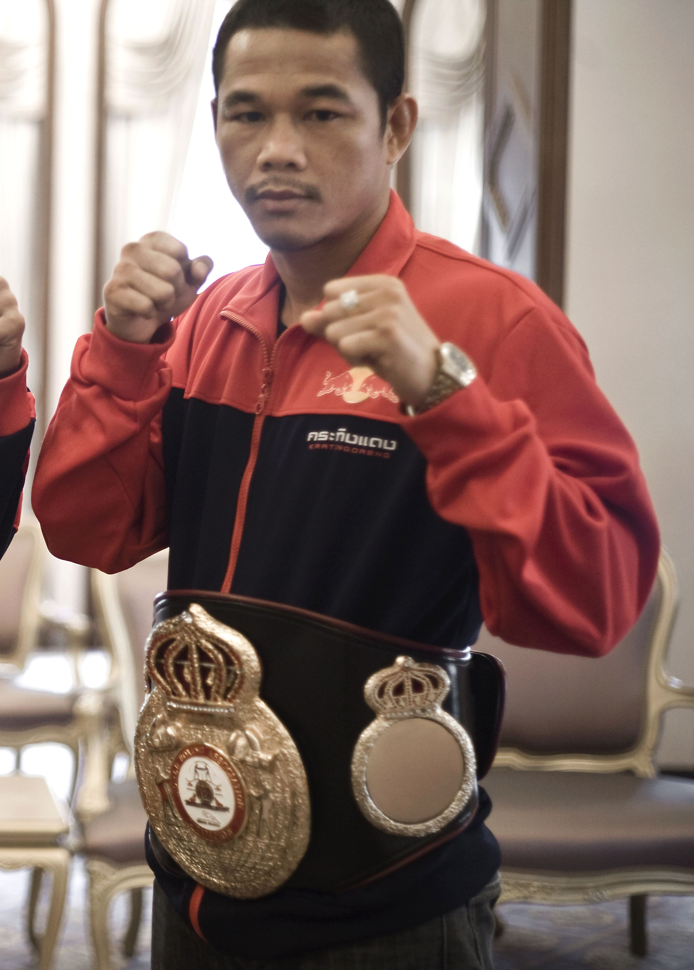 เด่นเก้าแสน กระทิงแดงยิม Denkaosan Kaovichit แชมป์ฟลายเวท WBA เข้าพบนายกรัฐมนตรี ณ ห้องสีม่วง ตึกไทยคู่ฟ้า ทำเนียบรัฐบาล 8ตุลาคม2552 (The Official Site of The Prime Minister of Thailand Photo by พีรพัฒน์ วิมลรังครัตน์)